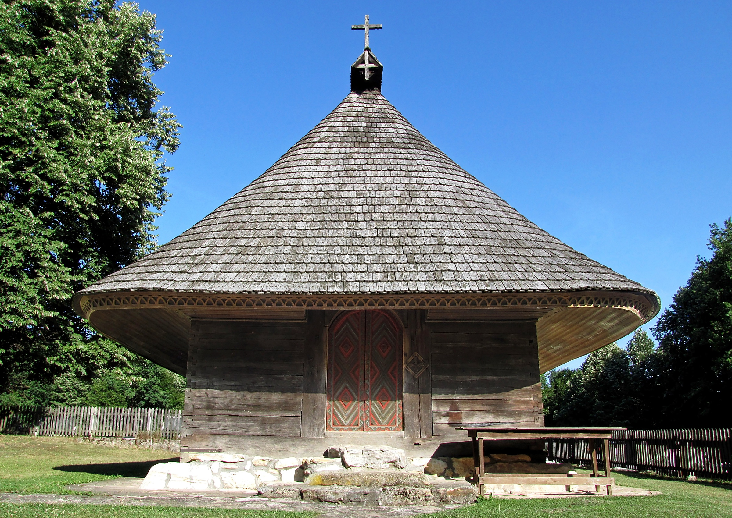 Црква брвнара